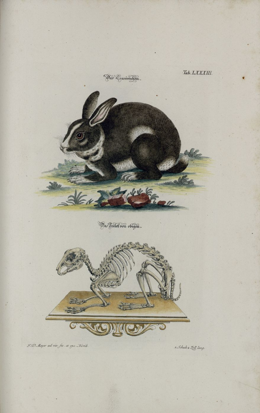 Angenehmer und nützlicher Zeit-Vertreib mit Betrachtung curioser Vorstellungen allerhand kriechender, fliegender und schwimmender, auf dem Land und im Wasser sich befindender und nährender Thiere, sowohl nach ihrer Gestalt und äusserlichen Beschaffenheit, als auch nach der accuratest davon verfertigten Structur ihrer Scelete oder Bein-Cörper, nebst einer deutlichen so physicalisch und anatomisch besonders aber osteologisch und mechanischen Beschreibung derselben / nach der Natur gezeichnet, gemahlet, in Kupfer gestochen und verlegt von Johann Daniel Meyer, Miniatur-Mahler in Nürnberg; Band 1; Nürnberg 1748 Tafel 83 Kaninchen